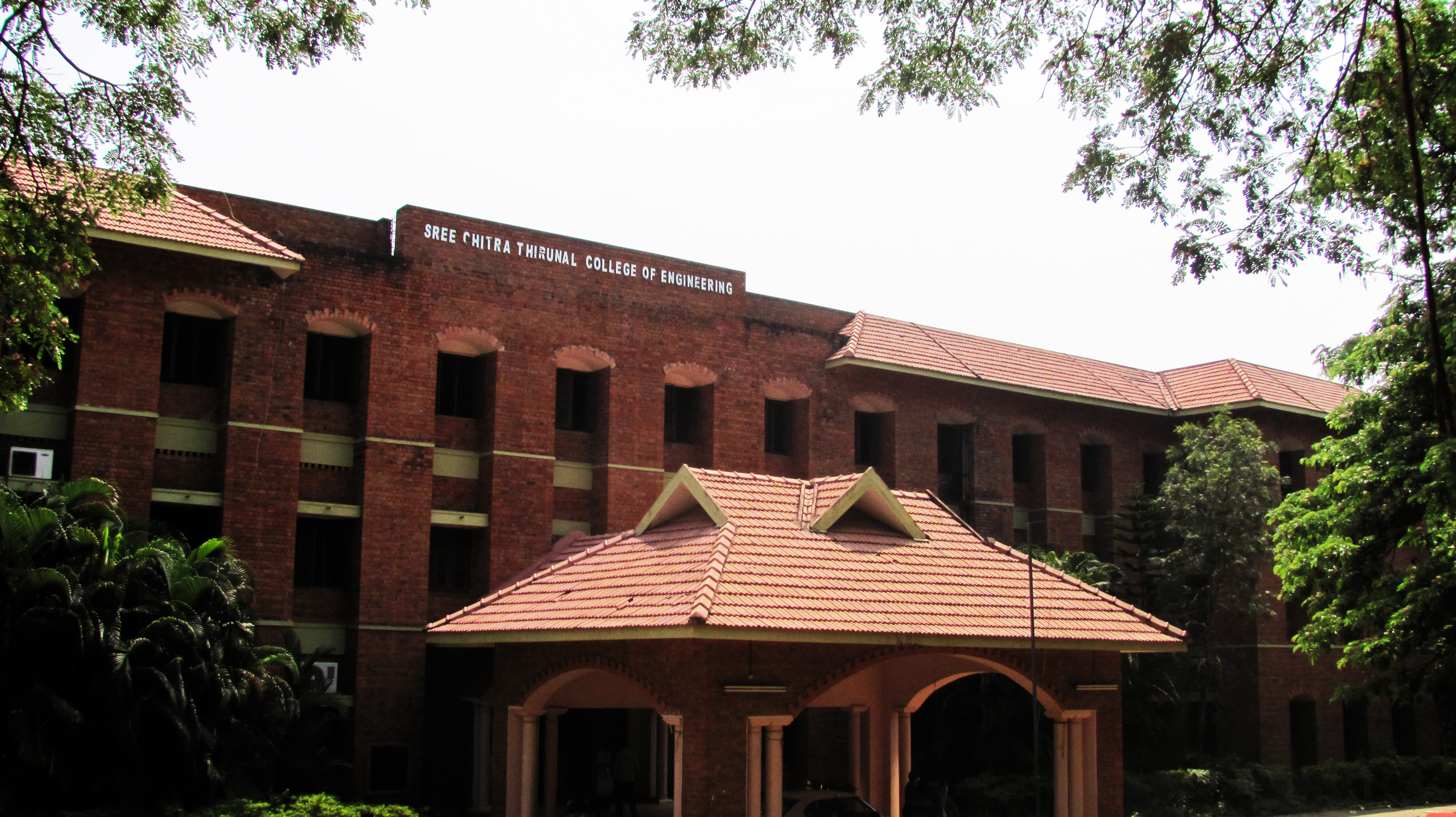 Front view